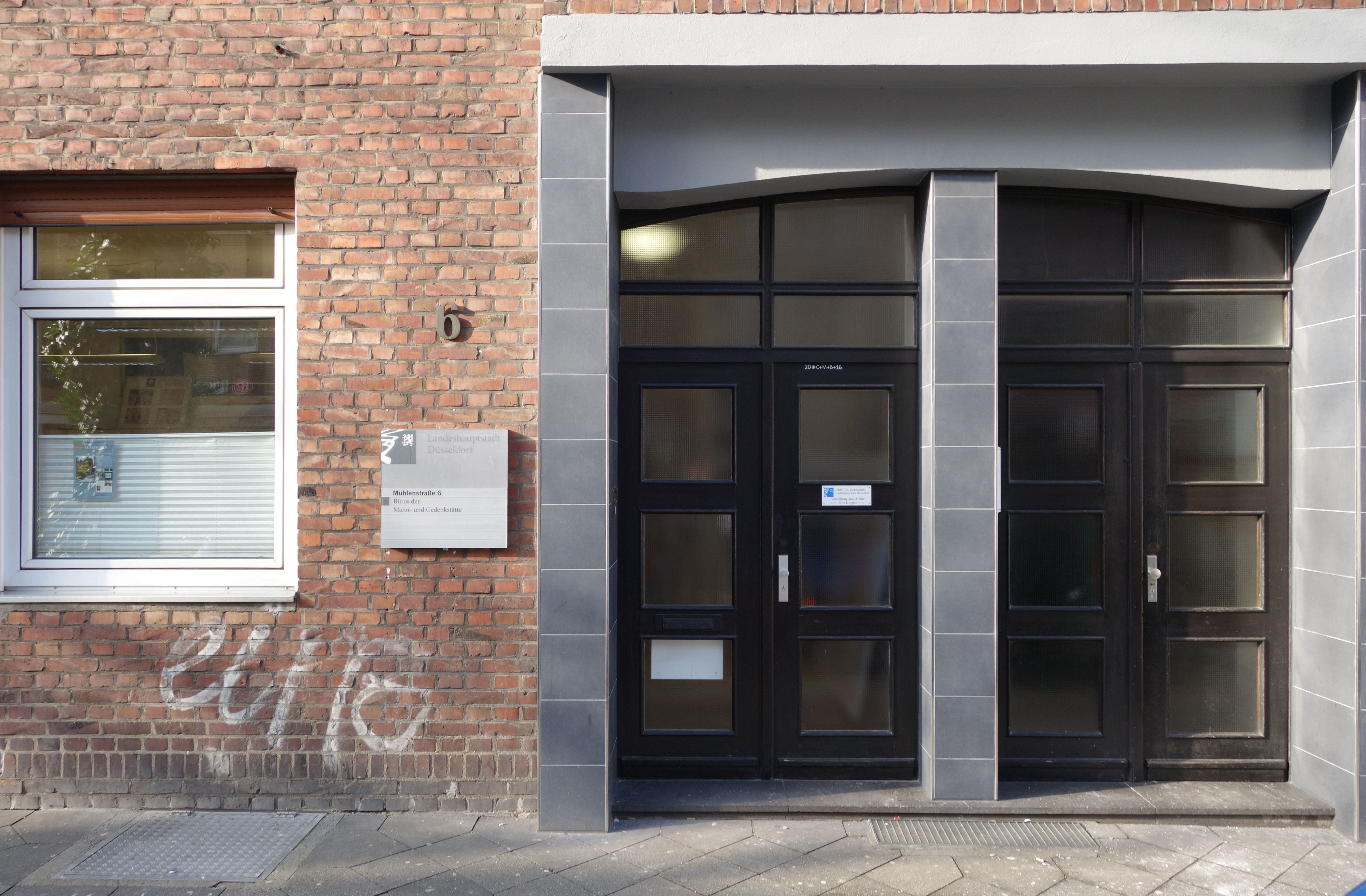 Düsseldorf, Mühlenstraße 6. März 2016. Büros und Archiv der Mahn- und Gedenkstätte der Stadt Düsseldorf.